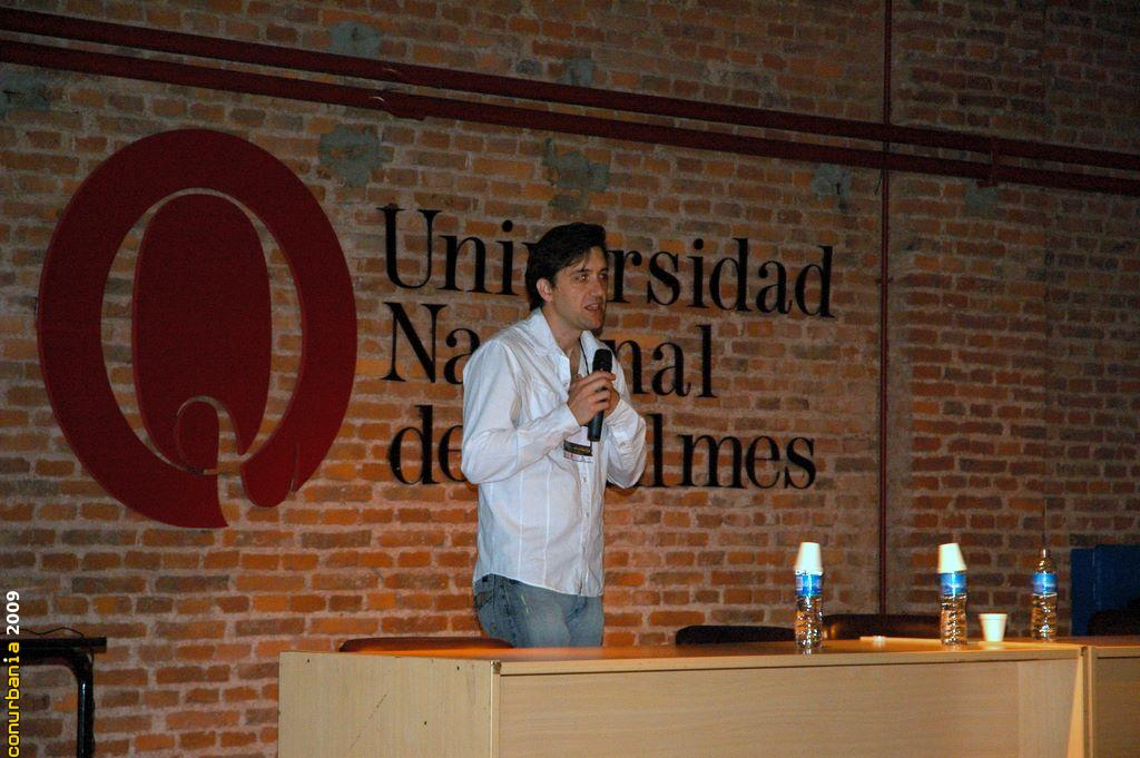 Daniel Coletti